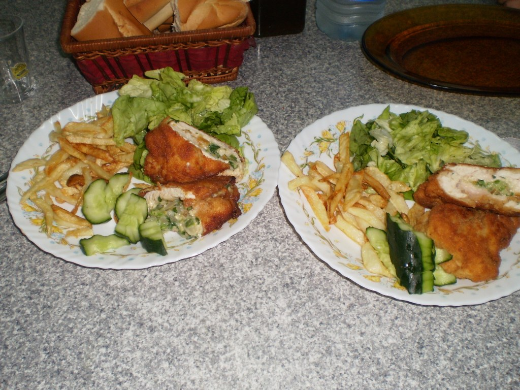 Repas somme toute léger pour les enfants durant les vacances de printemps.